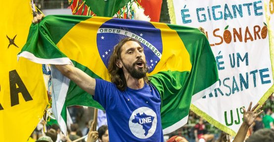 Iago Montalvão recém eleito presidente da UNE 2019-2021.